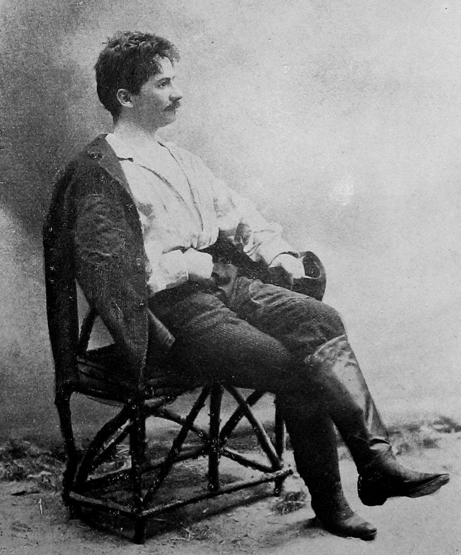 Portrait des Journalisten Emil Kläger (* 10. Oktober 1880 in Vyžnycja; † 2. Juni 1936 in Wien)